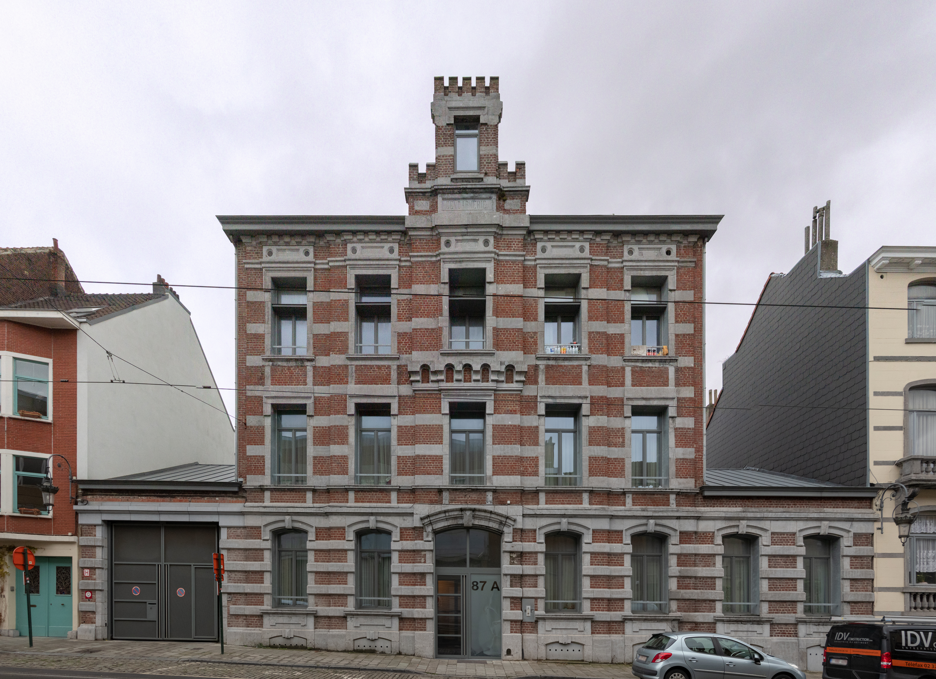 Ancienne caserne de gendarmerie de Laeken, Rue Stéphanie 77